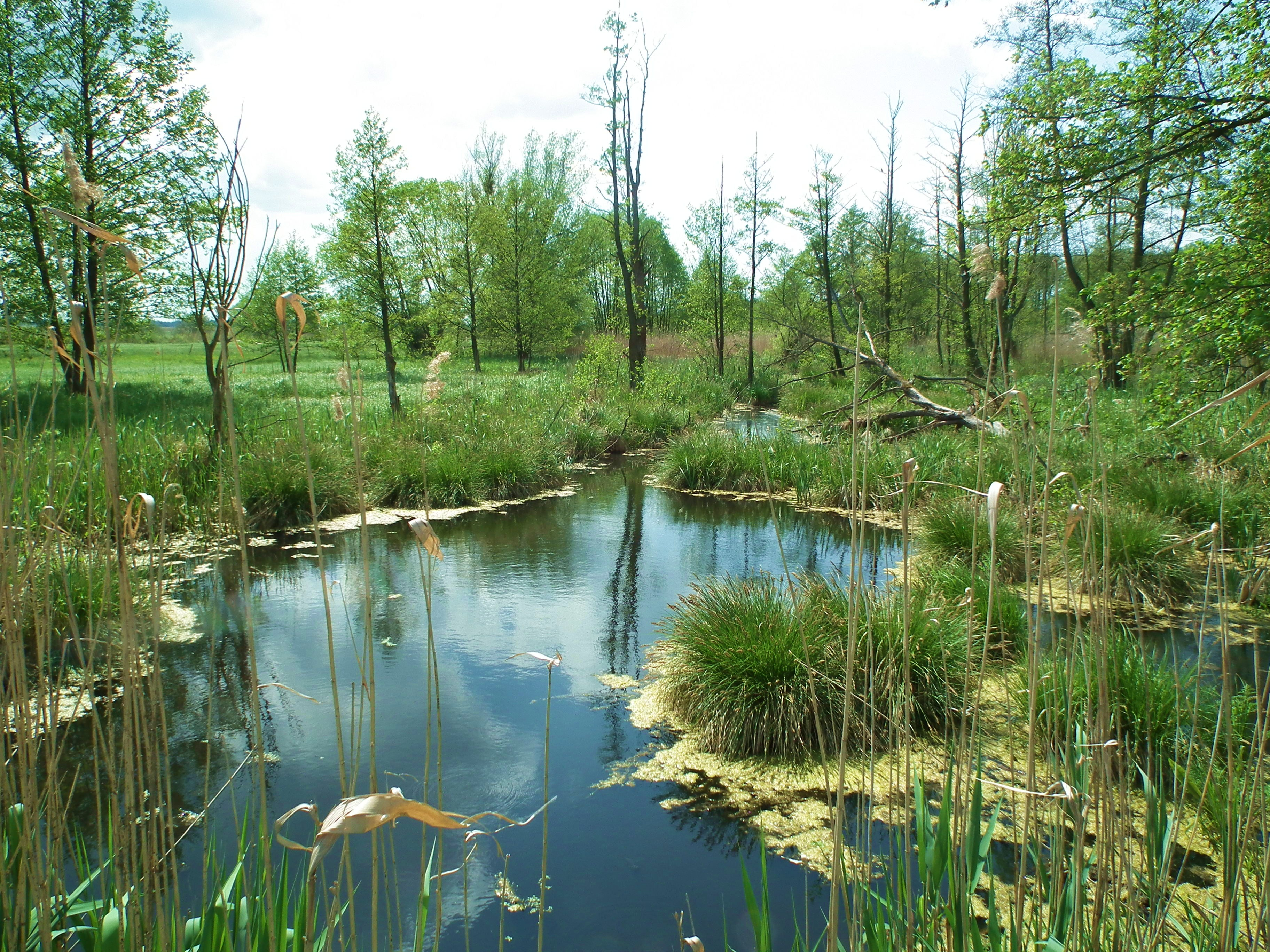 Park Narodowy Ujście Warty, polder płn. Rejon Starej Warty.